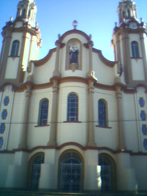 Igreja Santo Antônio, em Cachoeira do Sul